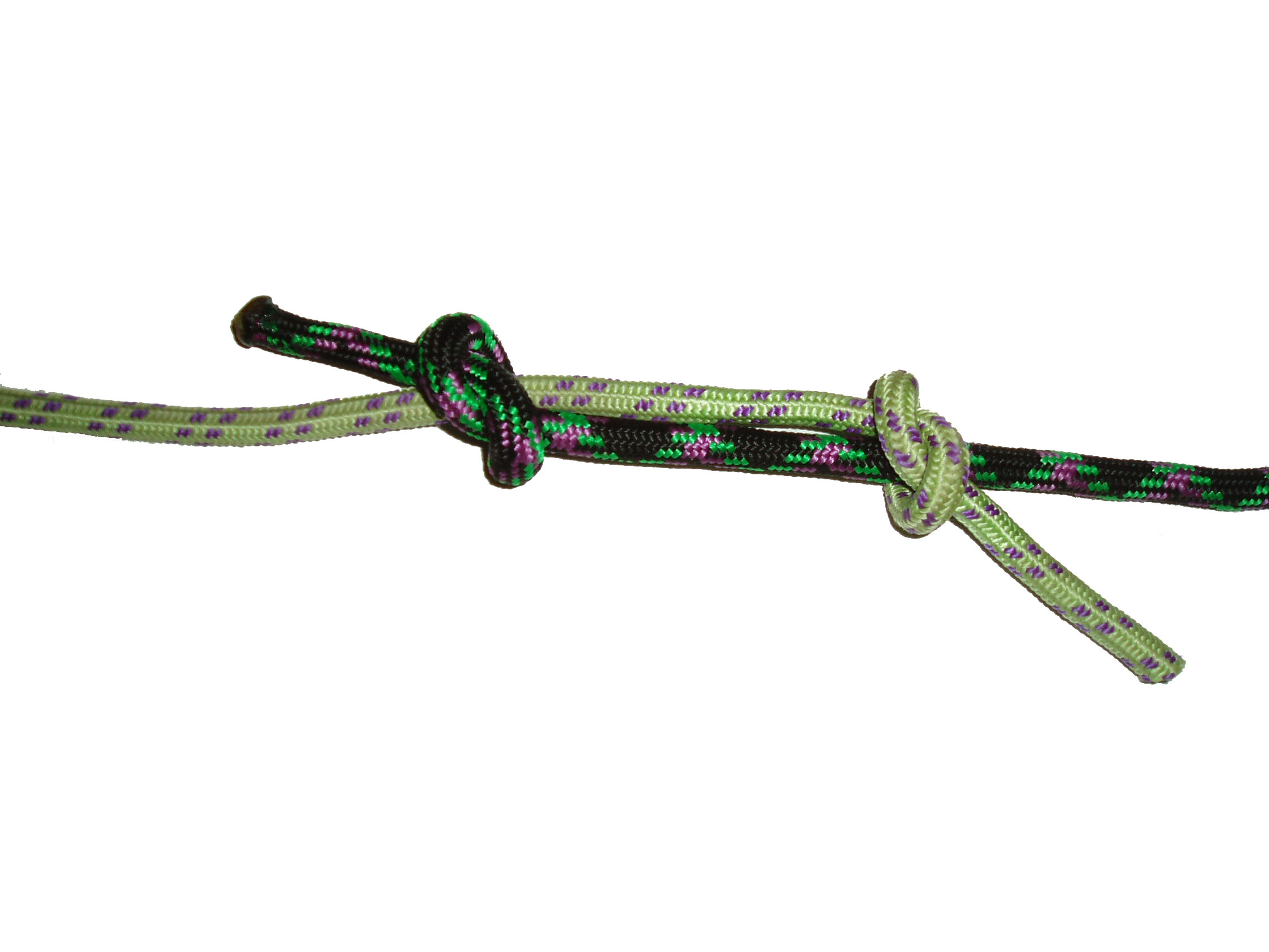 noeud de pécheur désséré